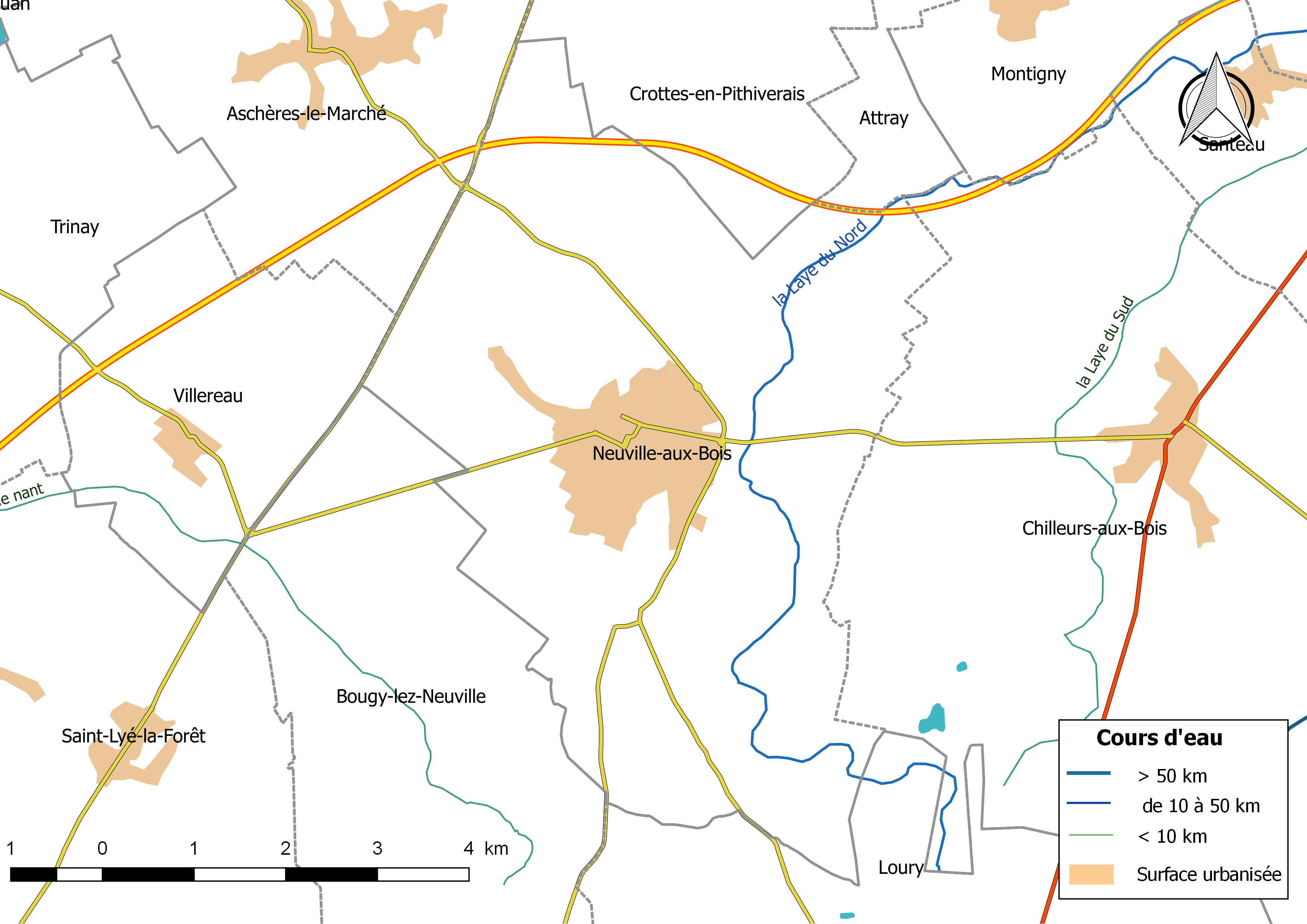 Carte du réseau hydrographique de la commune de Neuville-aux-Bois (France).